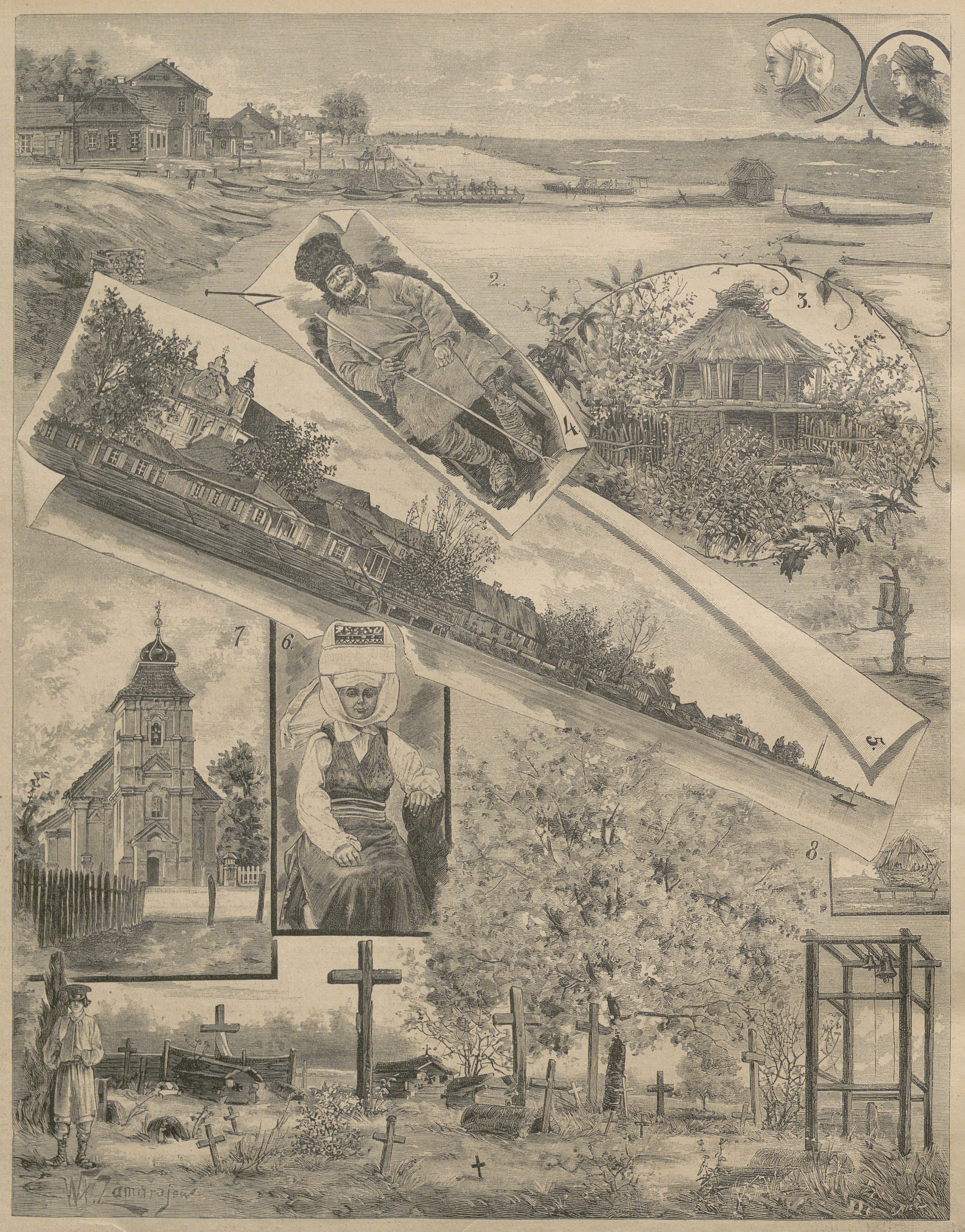 Беларуская (тарашкевіца): Піншчына (Pinščyna)